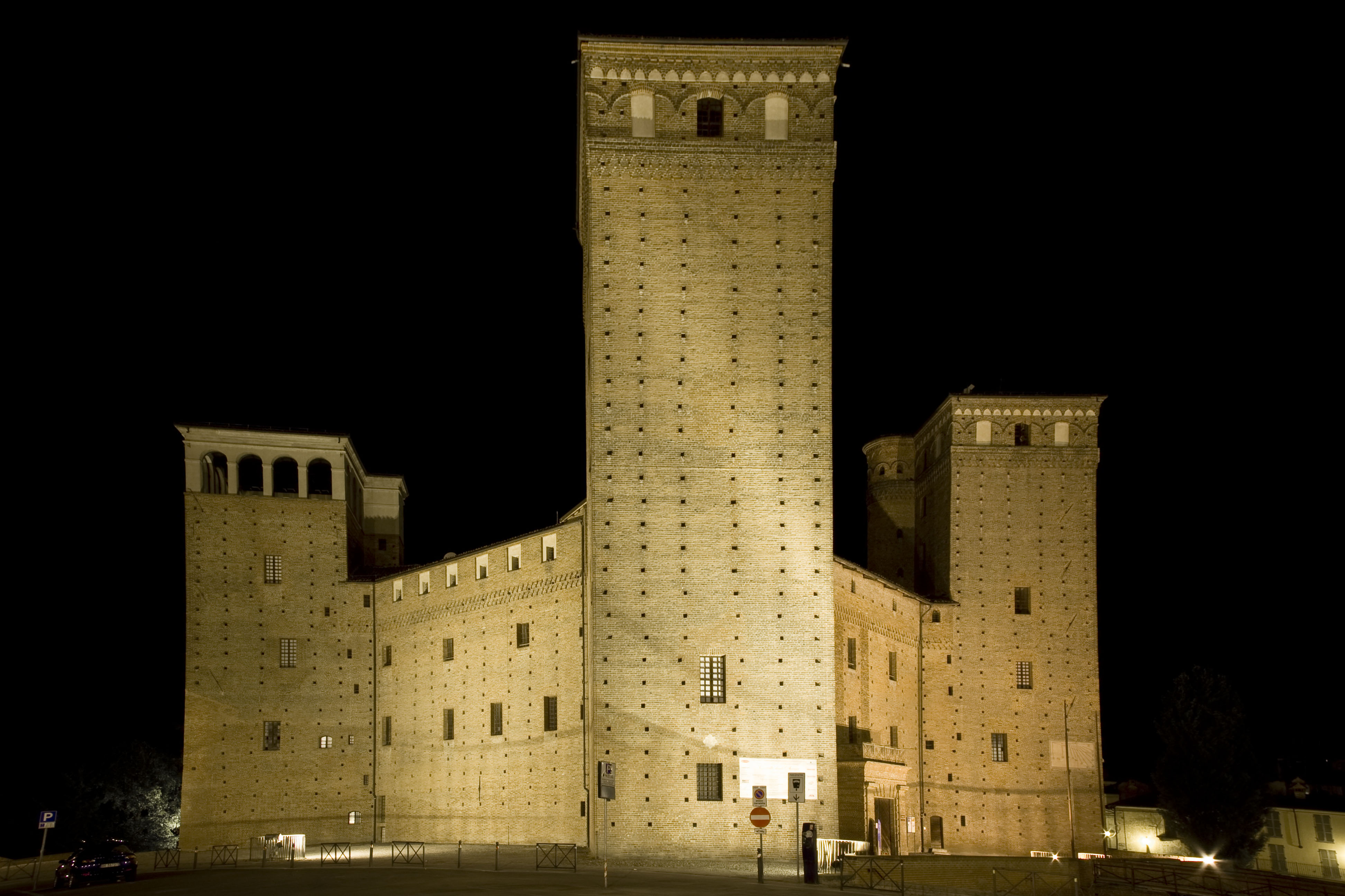 Il castello di Fossano, fotografia notturna